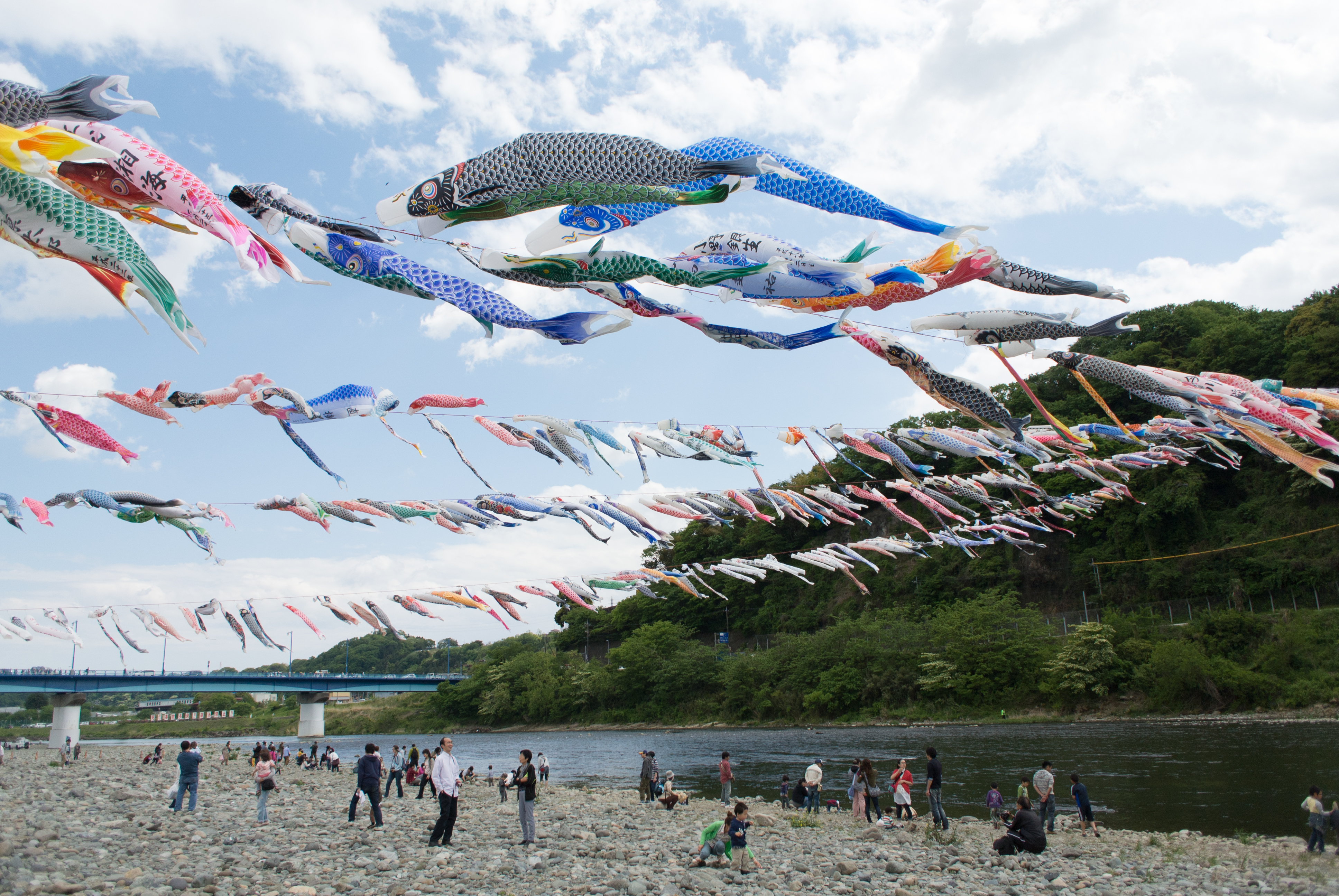 泳げ鯉のぼり相模川/相模原